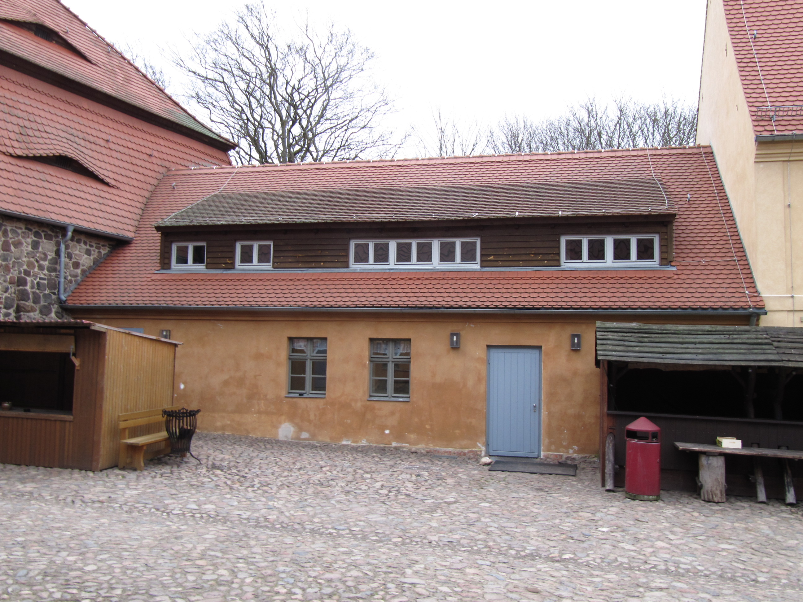 gebäude nordosten burghof rabenstein